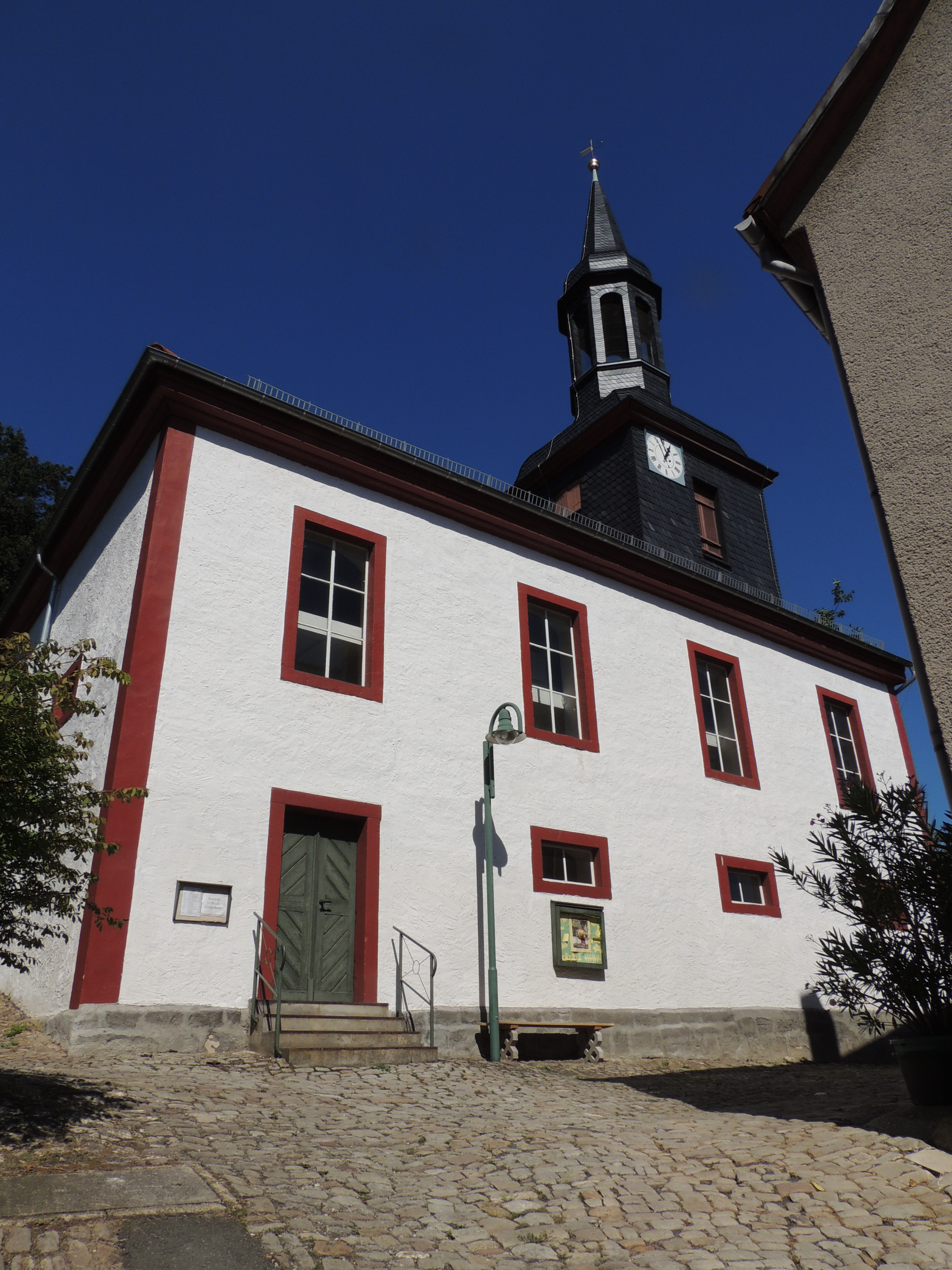 Denkmalgeschütztes Kirche in Zeutsch, Gemeinde Uhlstädt-Kirchhasel